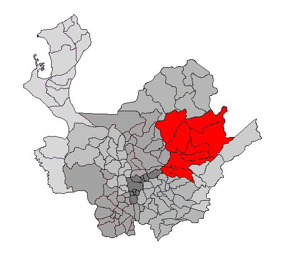 Ubicación de la región del Nordeste en el departamento de Antioquia